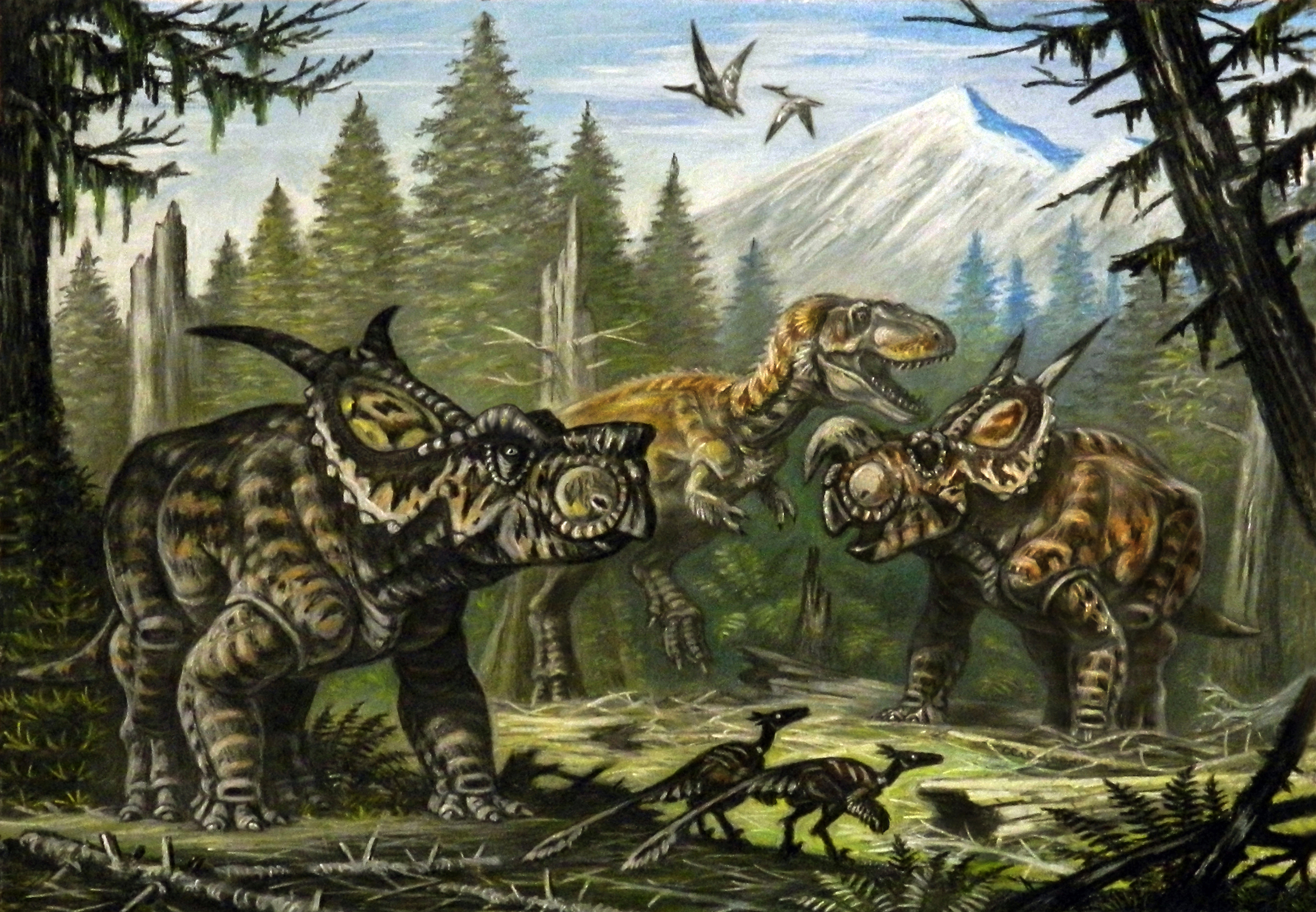 Achelousaurus, Einiosaurus, and a tyrannosaur.